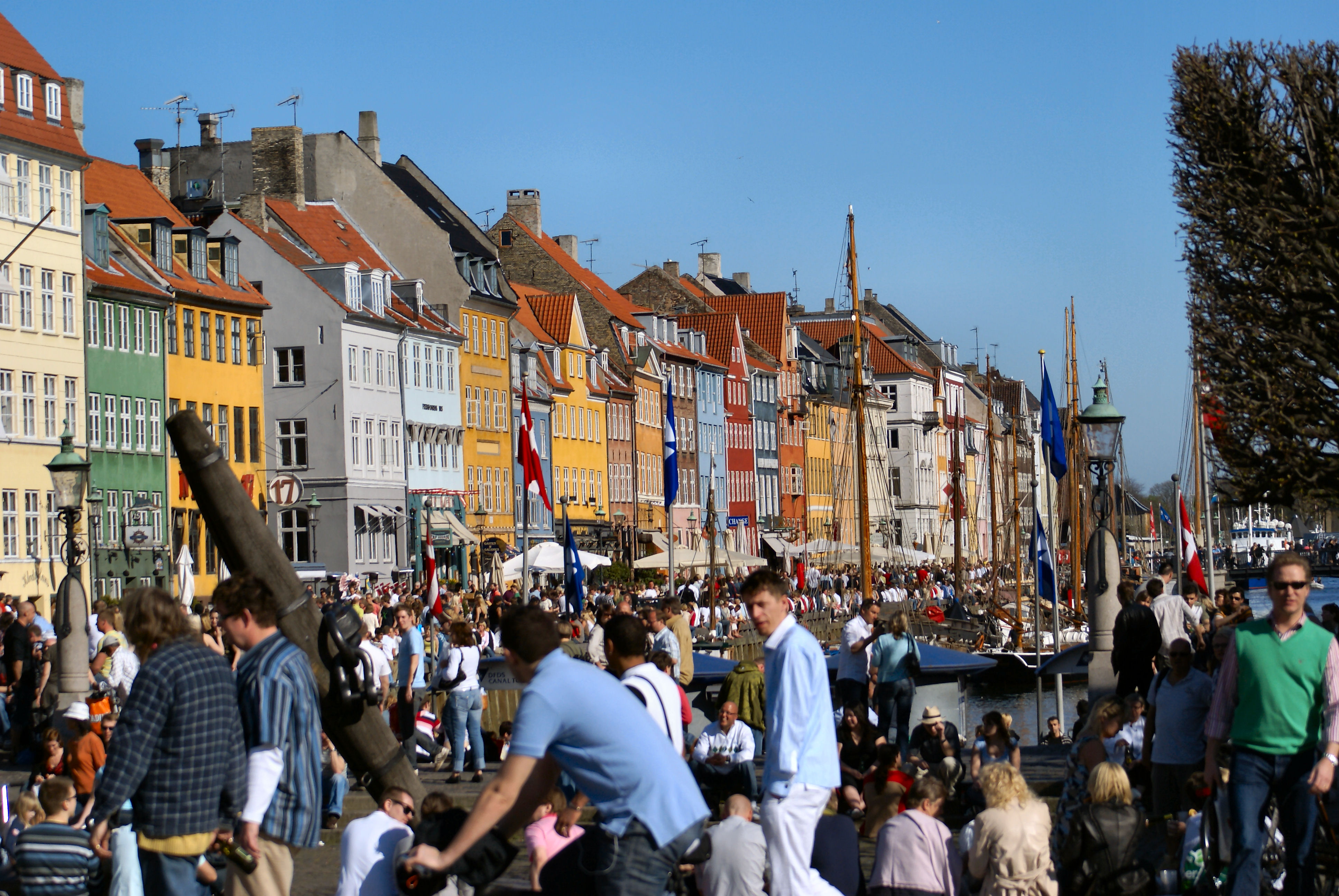 Nyhavn at spring time